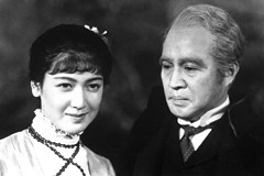 『巨人傳』、1938年、スチル写真